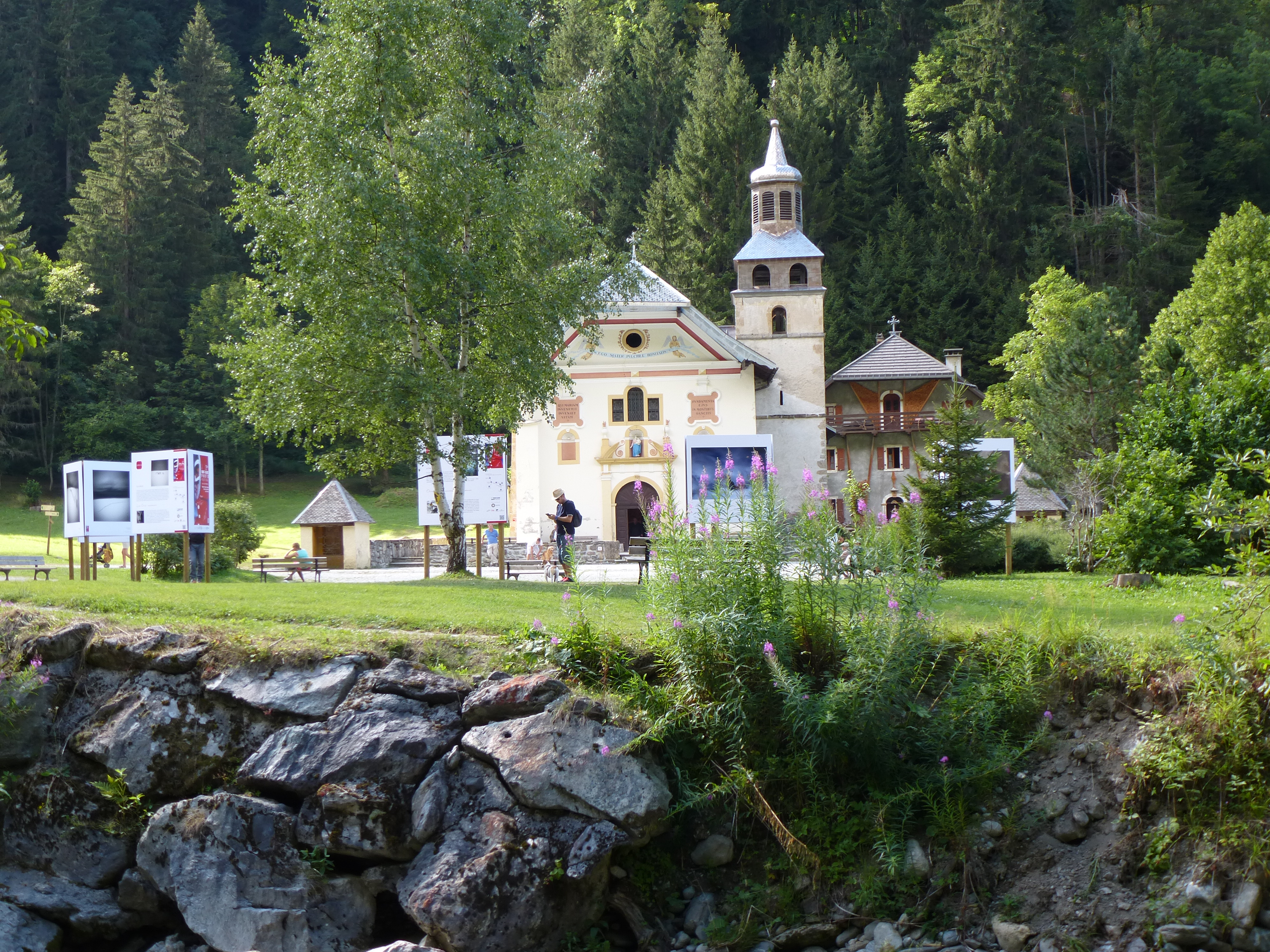 Notre-Dame de la Gorge.